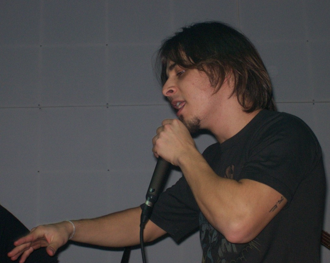 junior Lima na última apresentação da SoulFunk no Na Mata Café